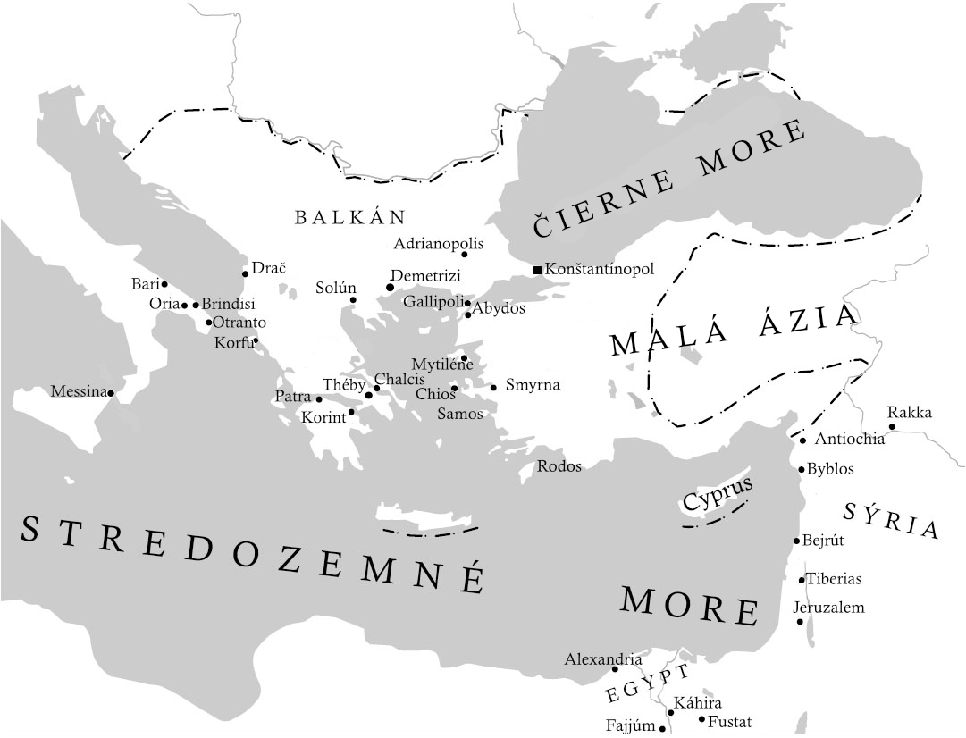 Významné židovské obce koncom 12. storočia v Byzantskej ríši a okolí. Podľa: Encyclopaedia Judaica. 2. vyd. Zväzok 4. Detroit, San Francisco, New York, New Haven, Cone, Waterville, Maine, London : Gale, 2007. ISBN 978-0-02-865932-9. S. 325